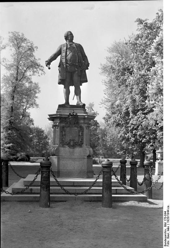 Potsdam.- Denkmal Friedrich Wilhelm I.